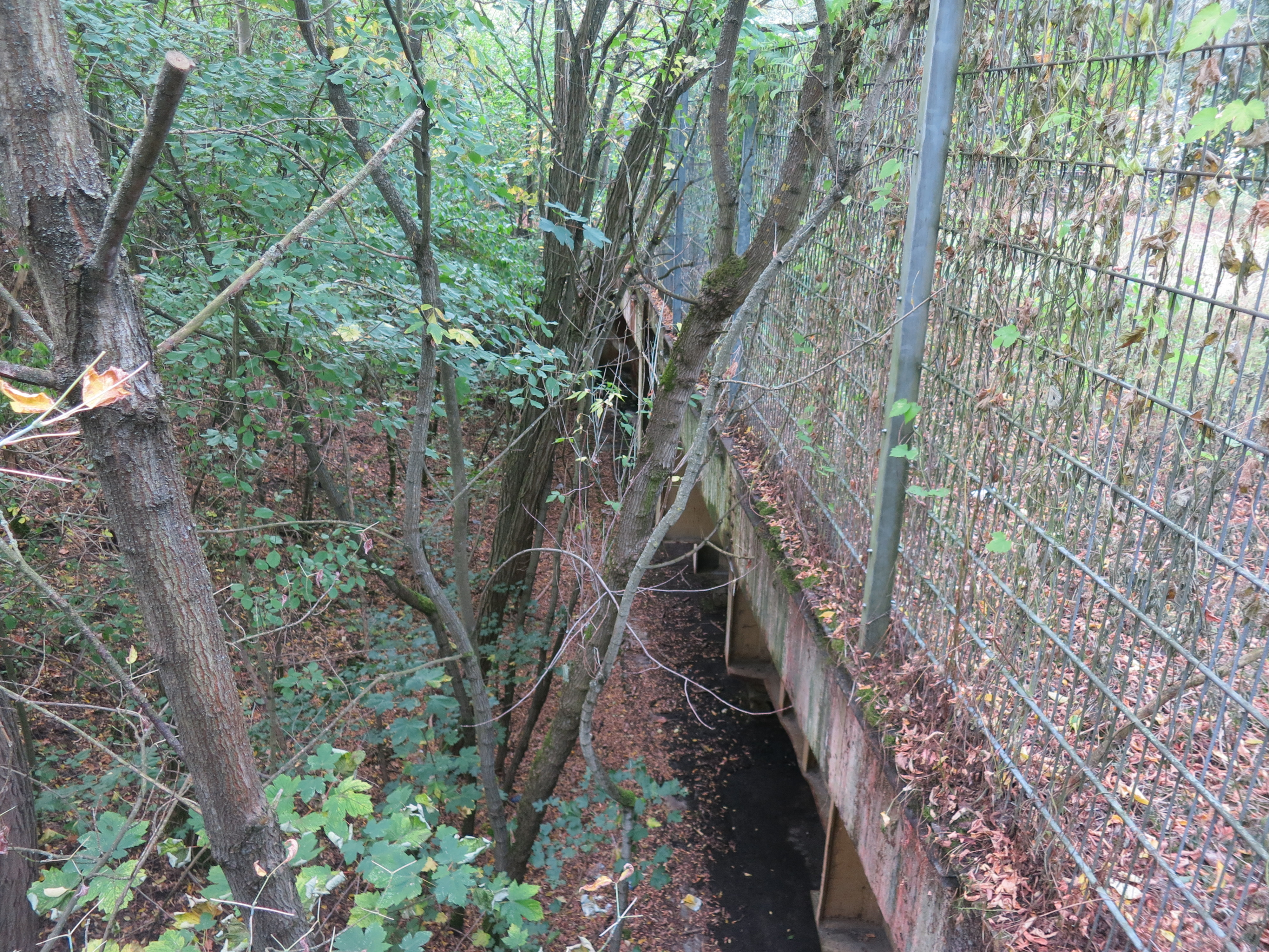 Autobahnbrücke Dreilinden, KfZ-GrabenThis is a photograph of an architectural monument.